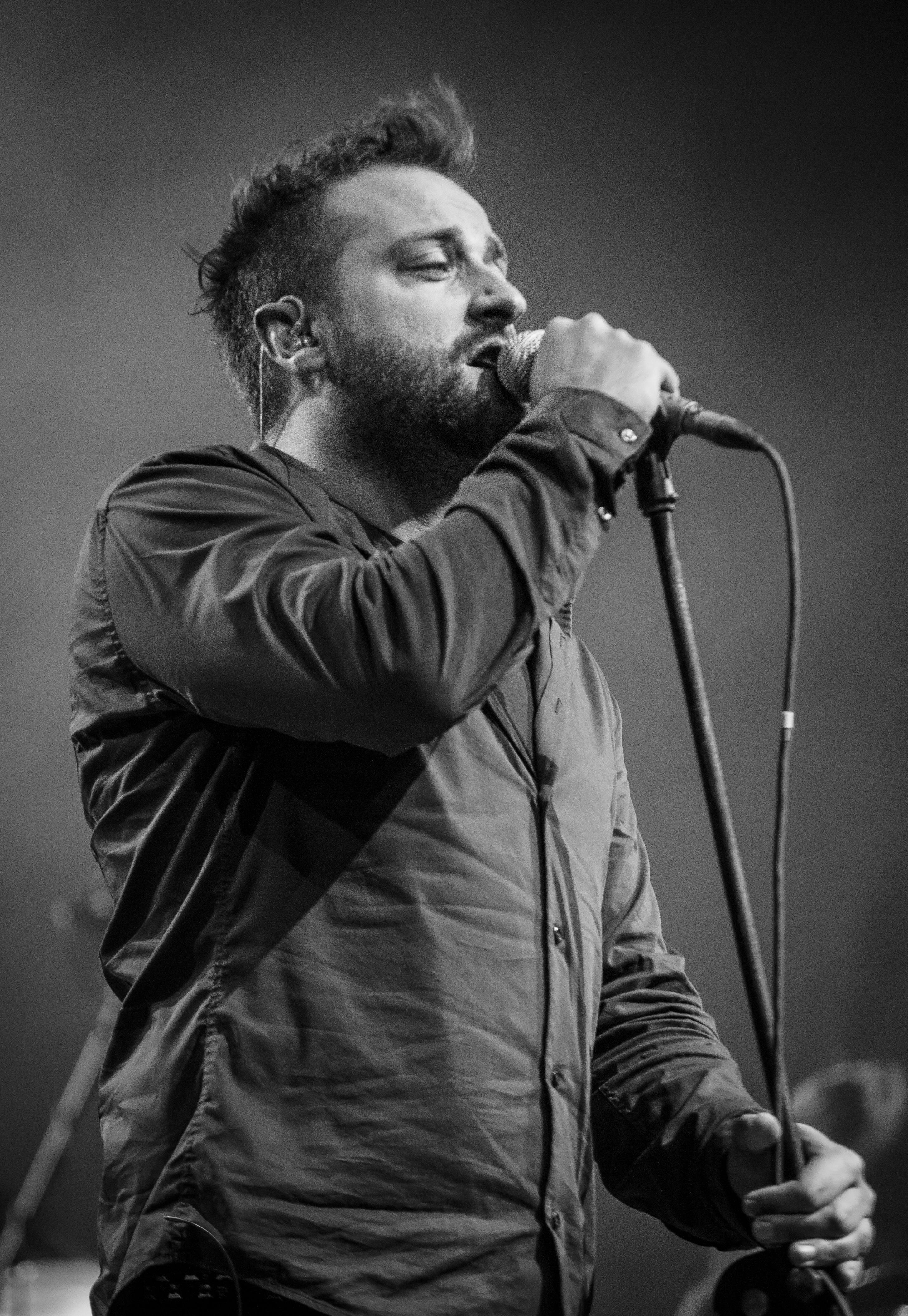 Łukasz Drapała, wokalista zespołu Chemia podczas Rocket Festiwal 2013 w Warszawie.